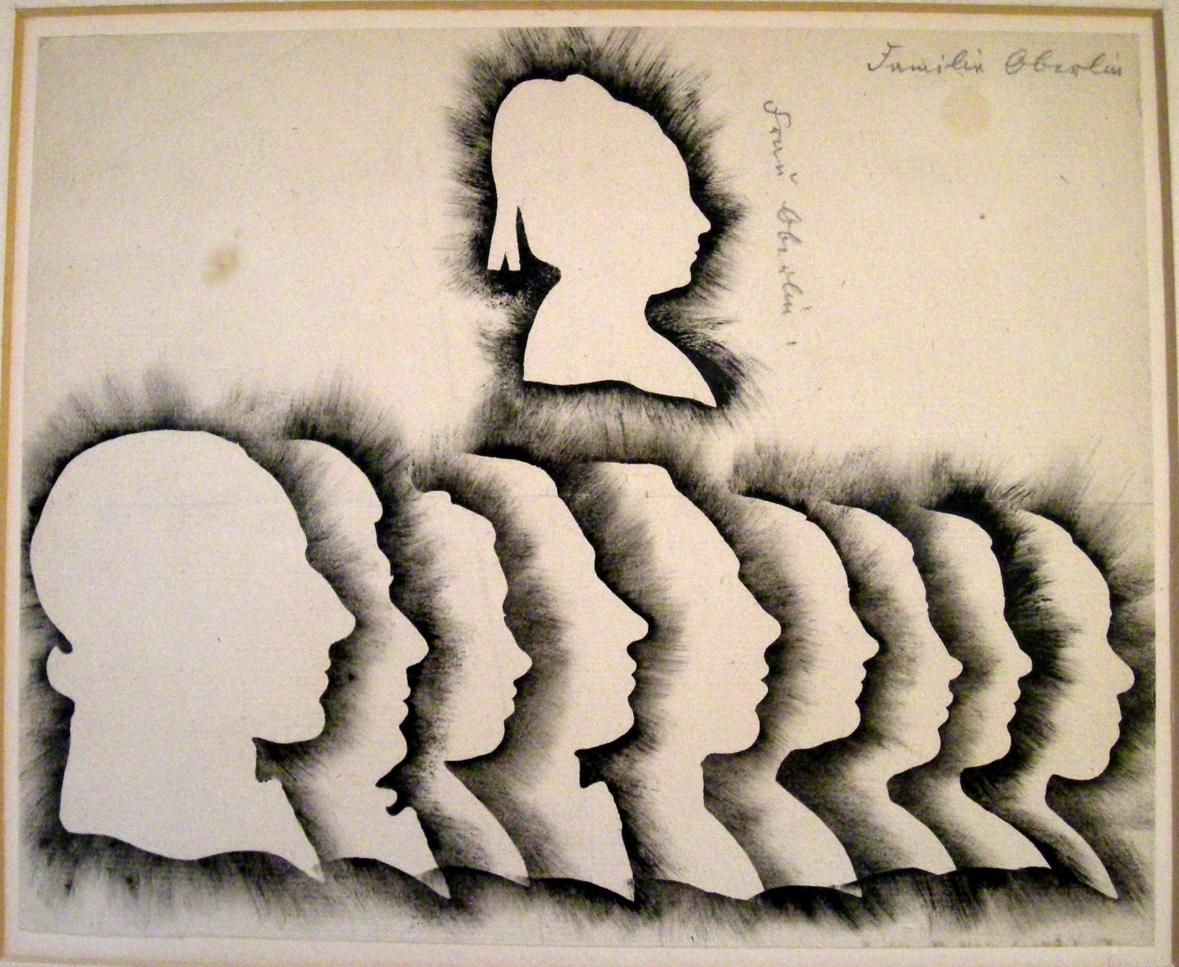 Composition au pochoir : les dix membres de la famille du pasteur Oberlin. Isolée en première rangée, son épouse, Salomé Madeleine, décédée en 1783.